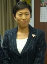 Senior Vice Minister Kiyomi Tsujimoto.